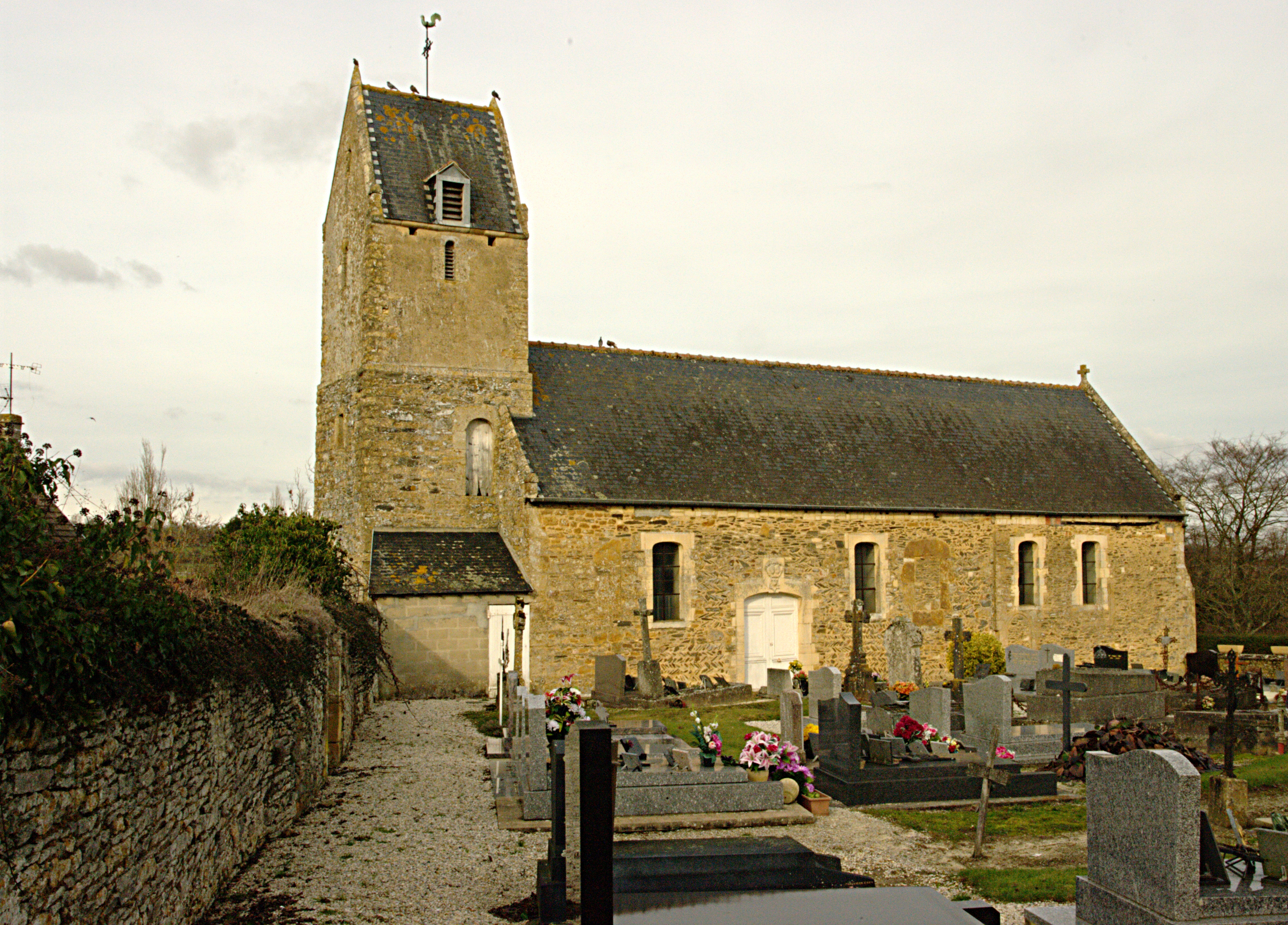 L'église de Goupillières, Calvados.